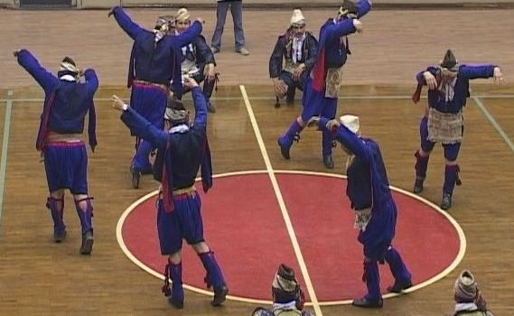 Balıkesir folkloru ile ilgili kendi çekimim.